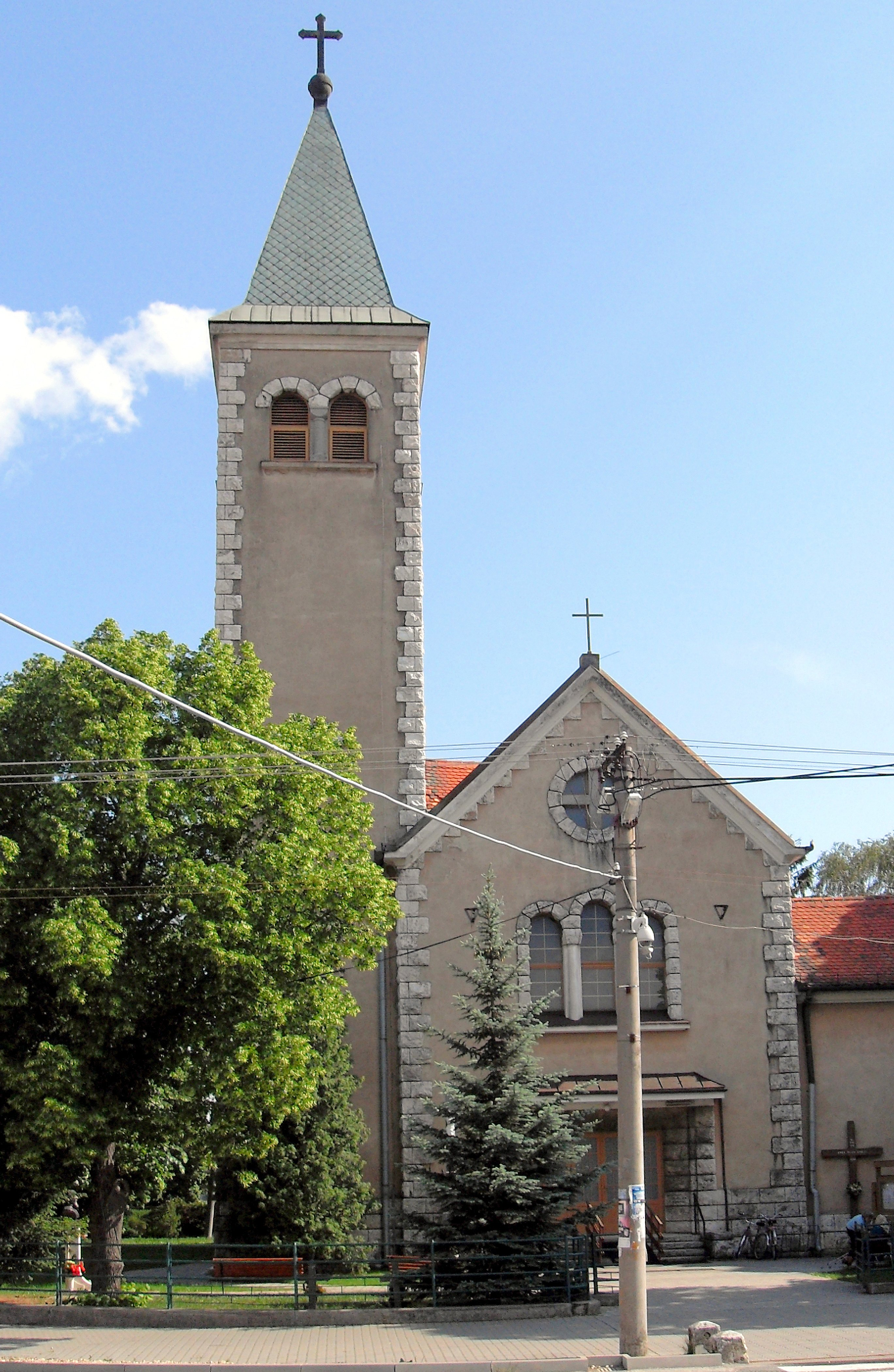 Košice-Krasná, Rímskokatolícky kostol svätých Cyrila a Metoda